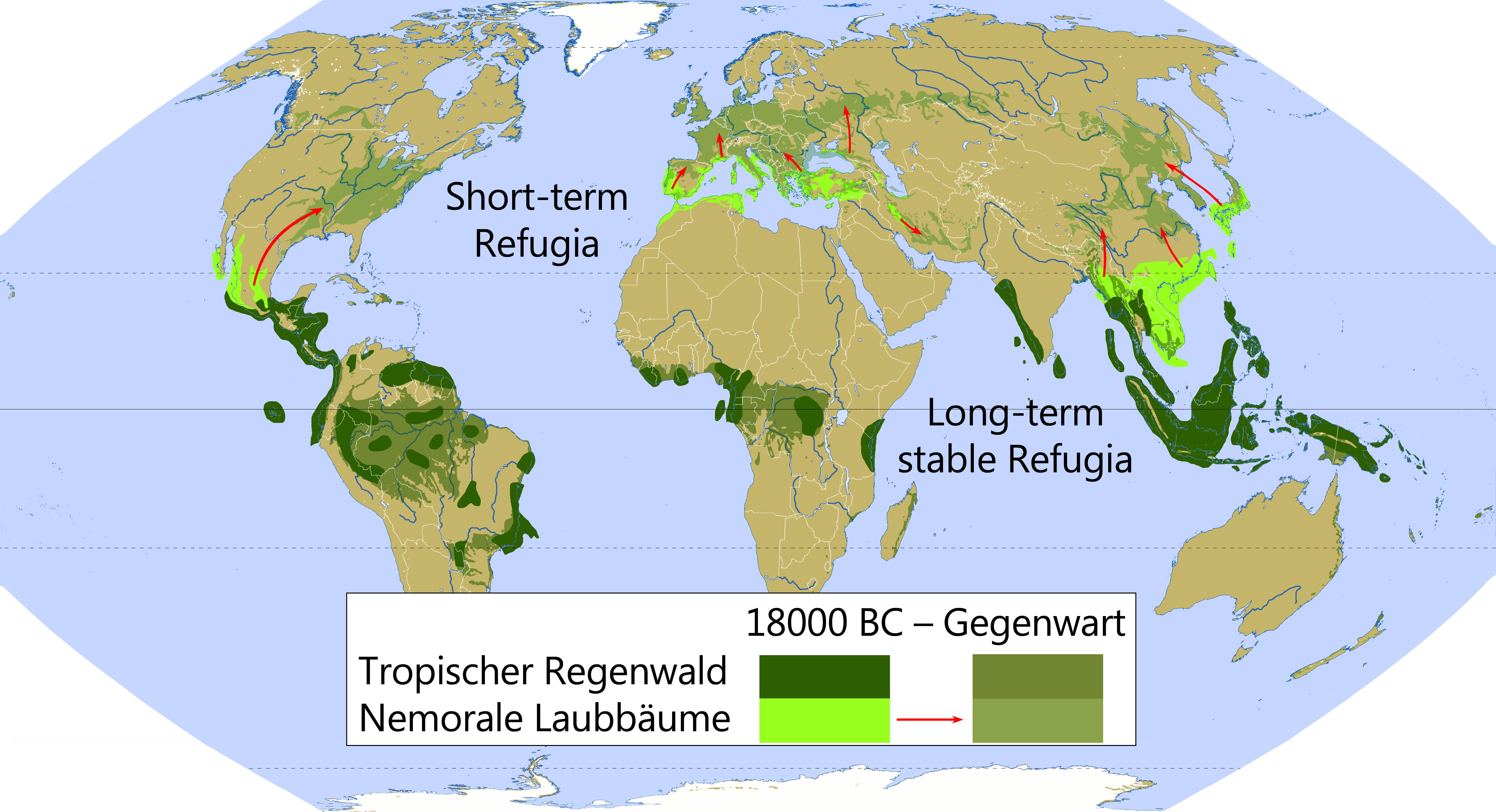 Quellen nach File: Vegetationszonen 18.000 BC